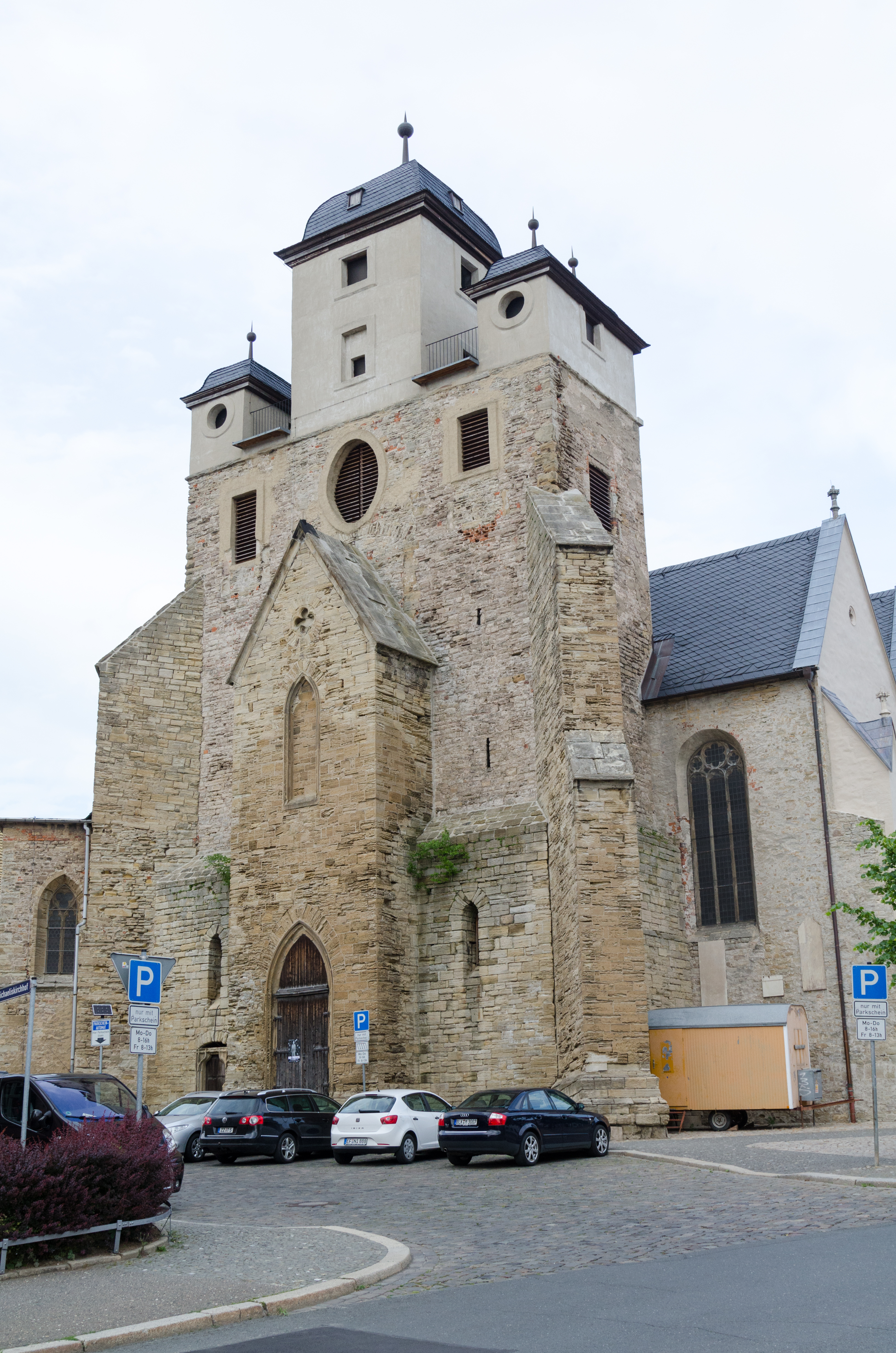 Zeitz, Michaeliskirche